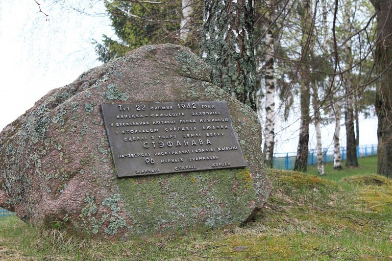 Мемарыял на месцы спаленай вёскі Стэфанава